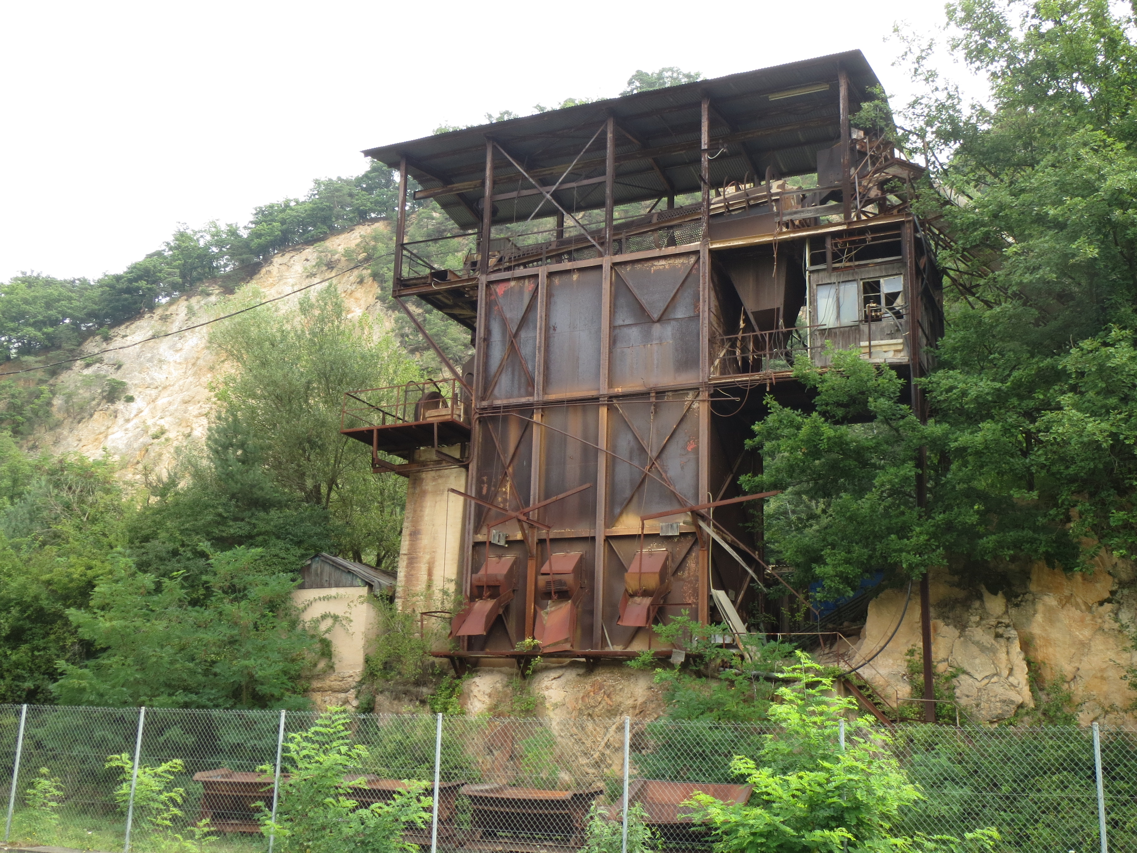 Brecheranlage, am Eingang zum Steinbruch Leferenz, von Westsüdwesten aus gesehen